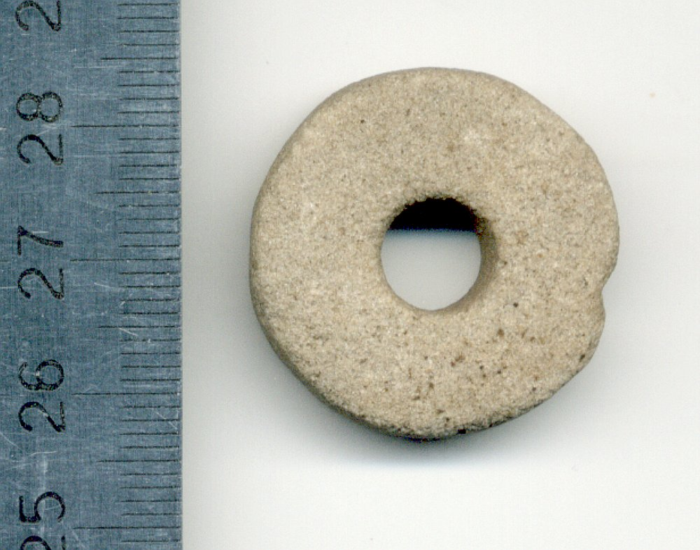 Przęślik (XII-XIII wiek) z łupku wołyńskiego znaleziony na Białostocczyźnie. Own work 2007-01-14